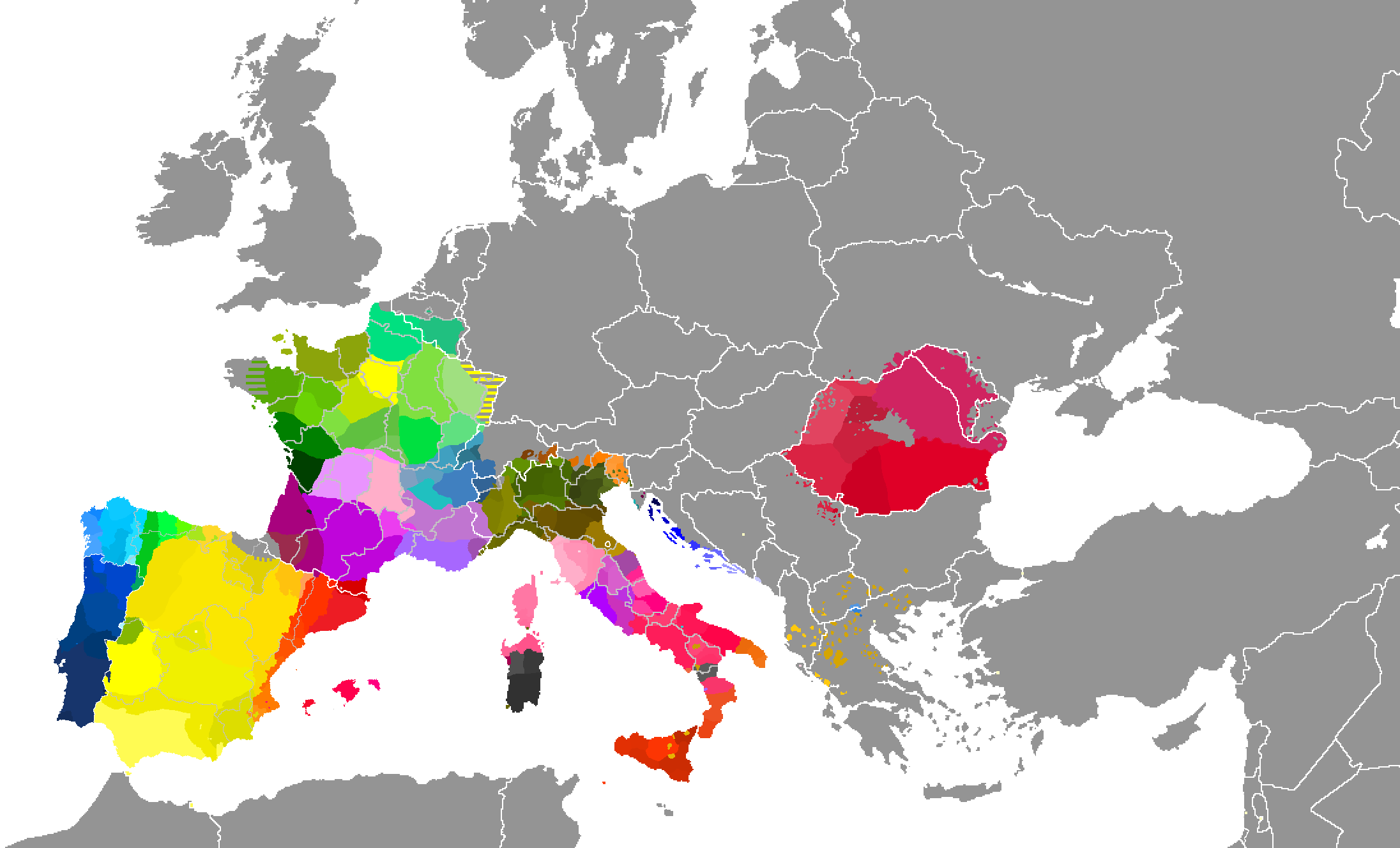 Idiomas y dialectos romances